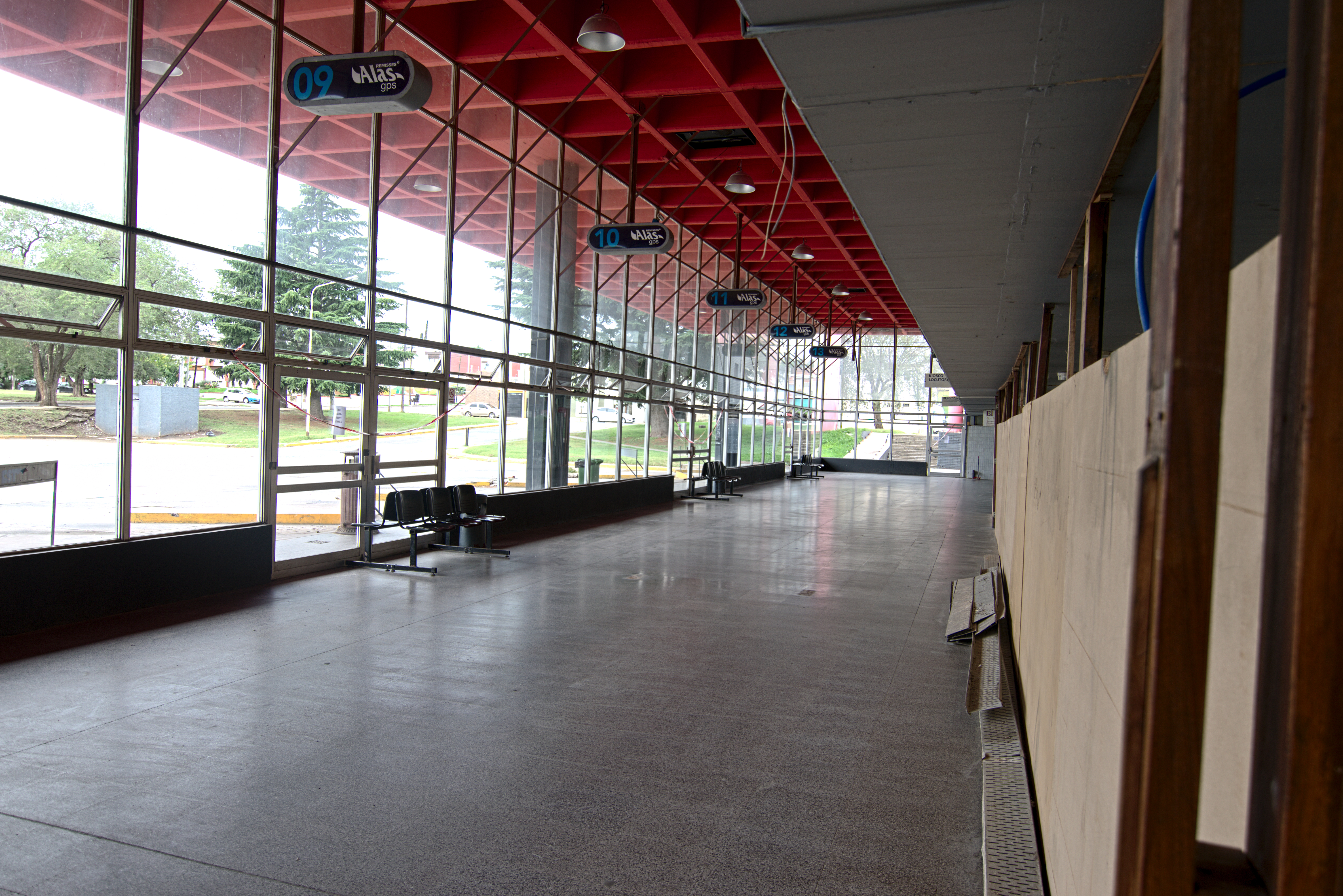 Hall Central de la terminal de omnibus de Tandil vacío